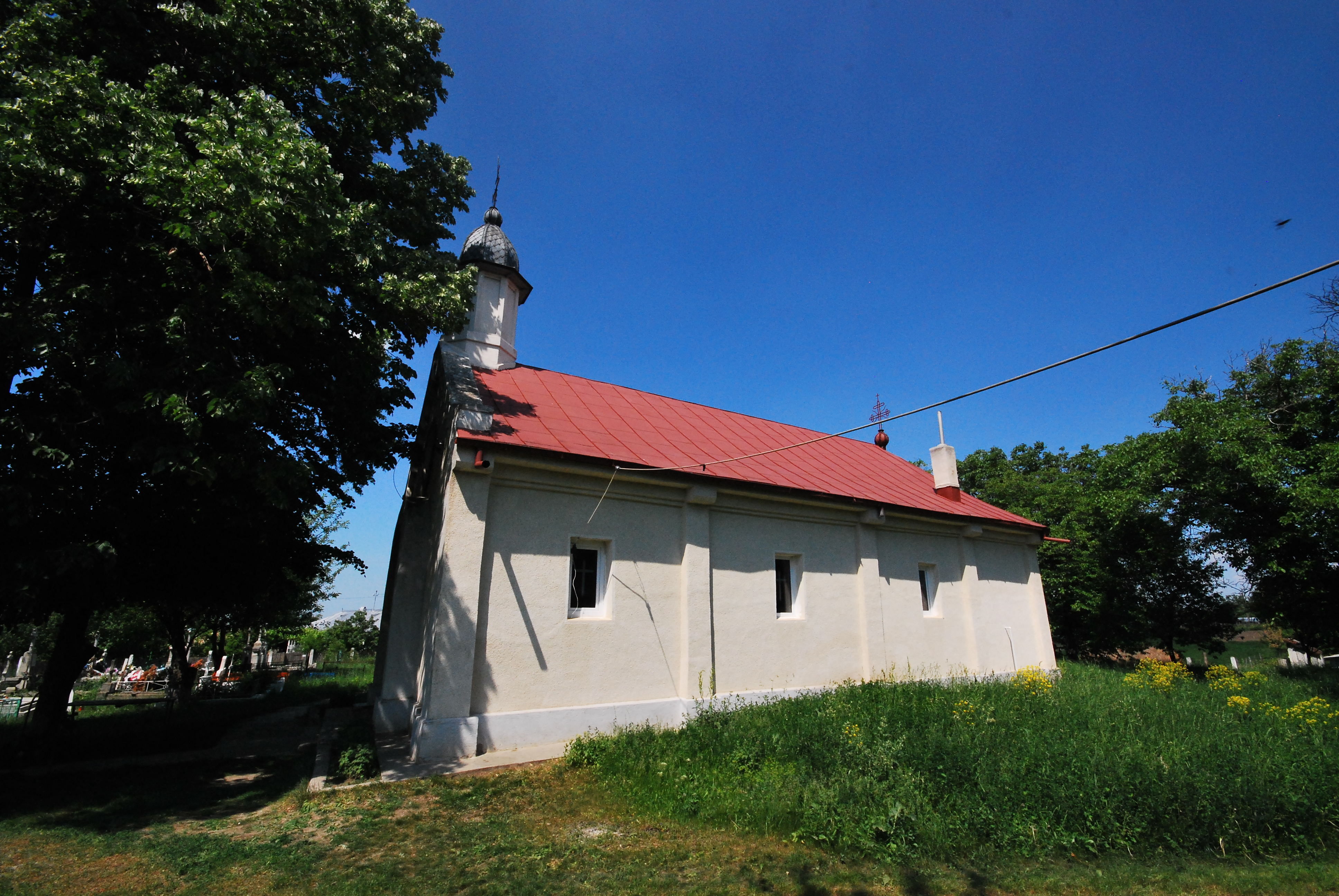 Biserica "Sf. Nicolae"